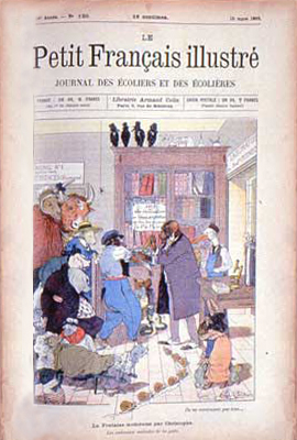 Couverture de Le petit Français illustré